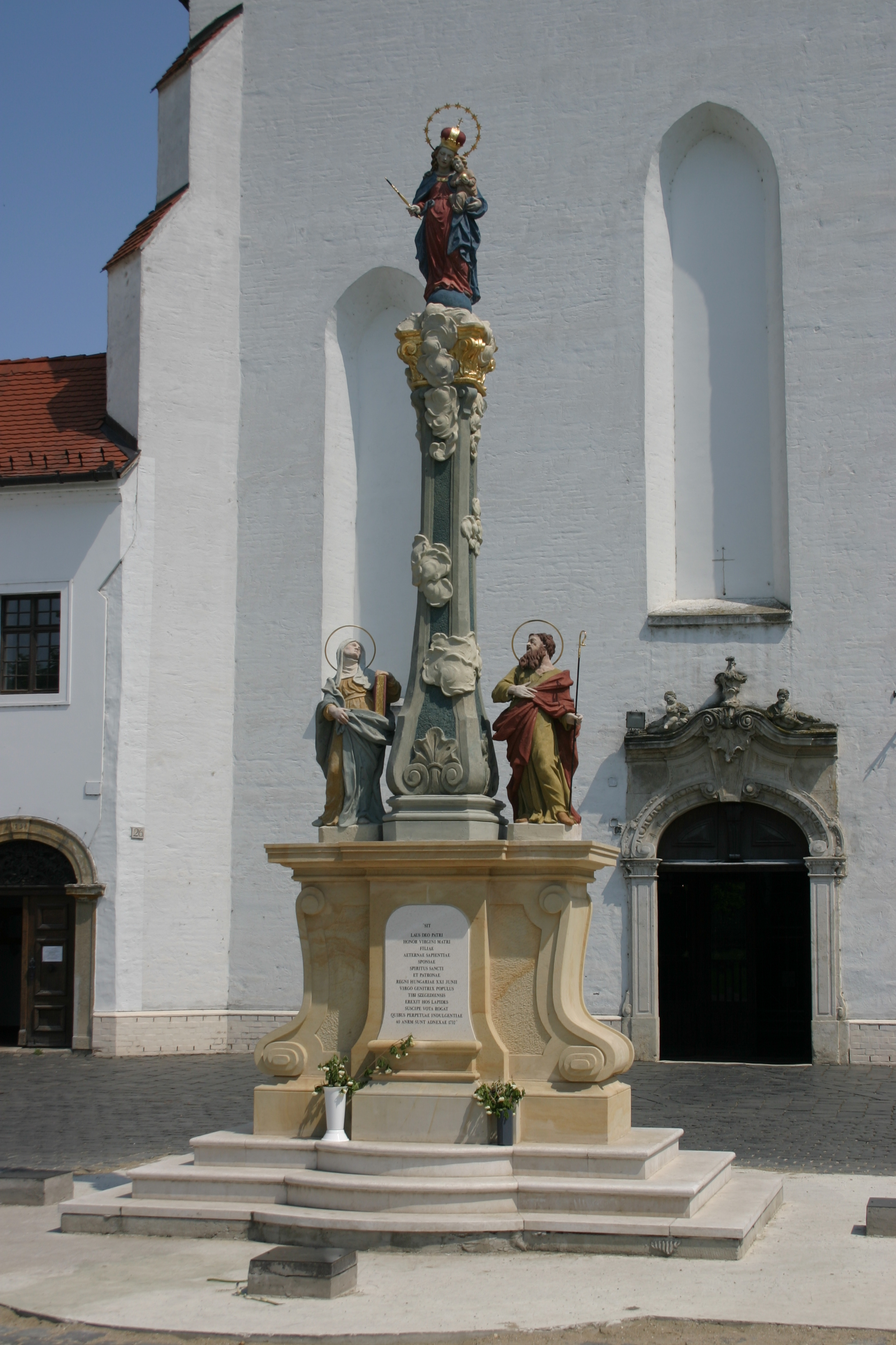 Szűz Mária, Magyarország védőszentje. Barokk szobor 1724-ből, felújítva 2007-ben (Szeged-Alsóváros)